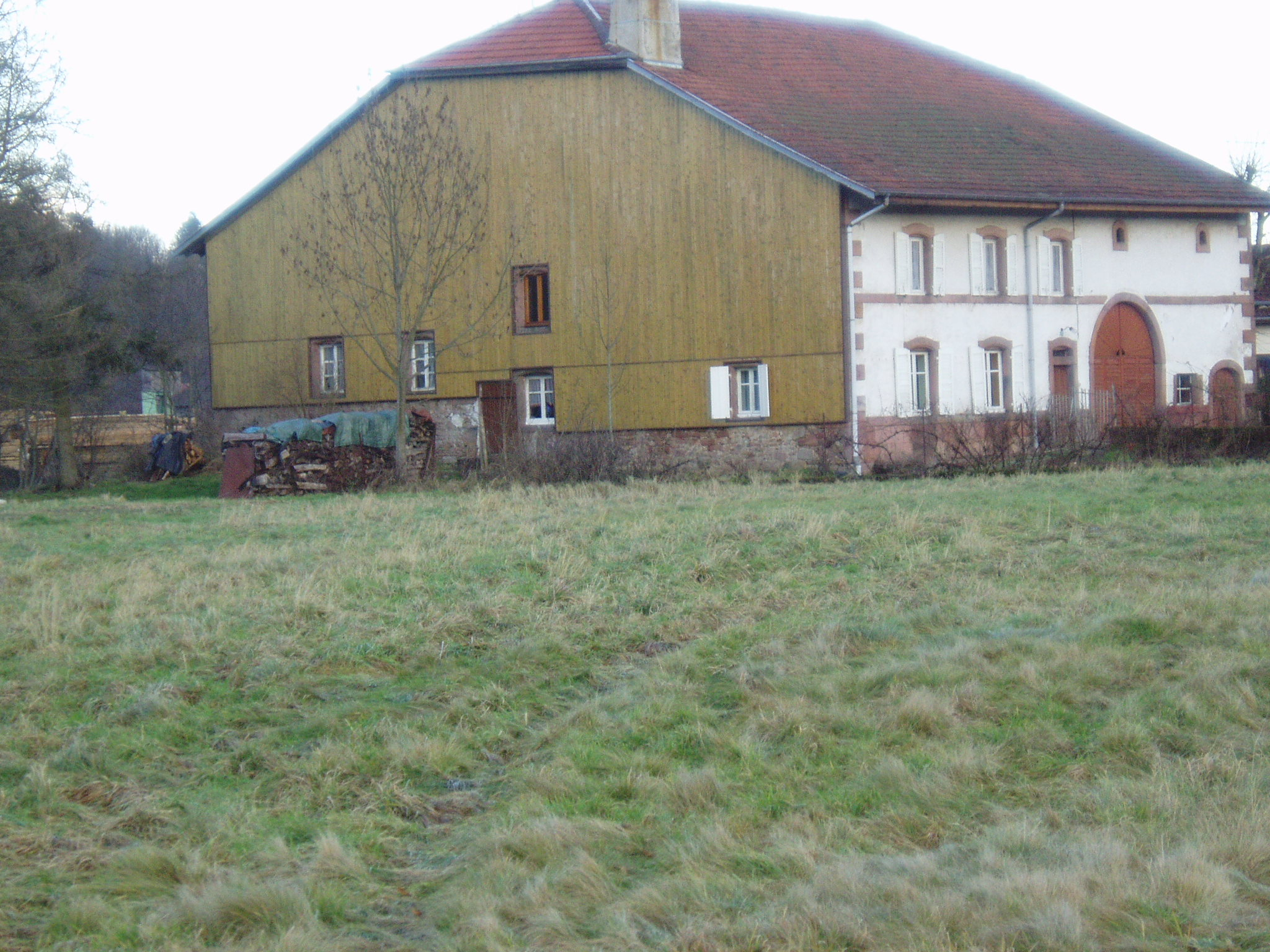 Ferme des Vosges gréseuses à demi-croupe, vallée de la Meurthe.